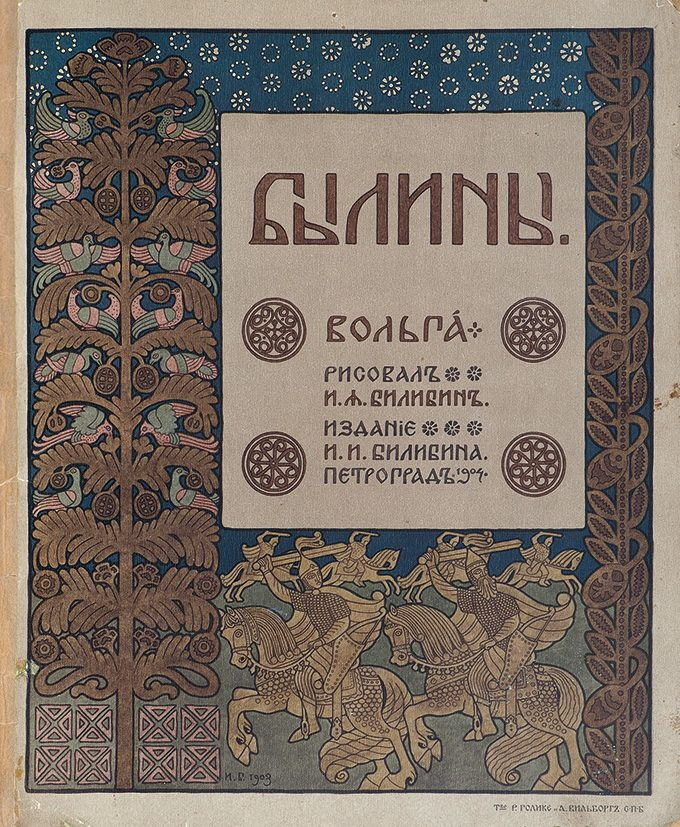 Былины: Вольга / рис. И.Я. Билибин; изд. И.И. Билибина. Пг.: Т-во Р. Голике и А. Вильборг, 1904. 16 с., ил. 37 х 31 см.